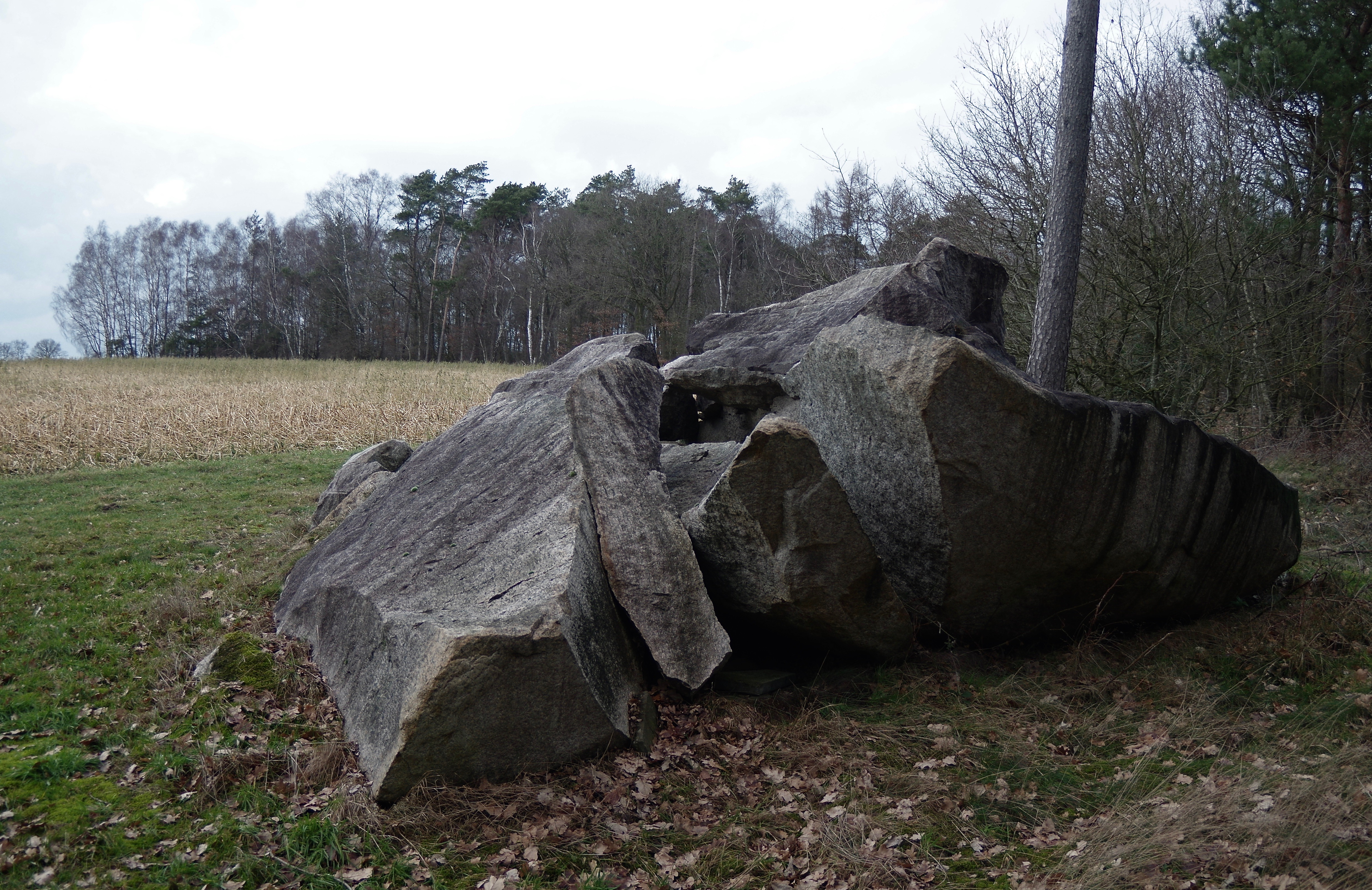 Großer Findling der bei der Bergung zerbrach